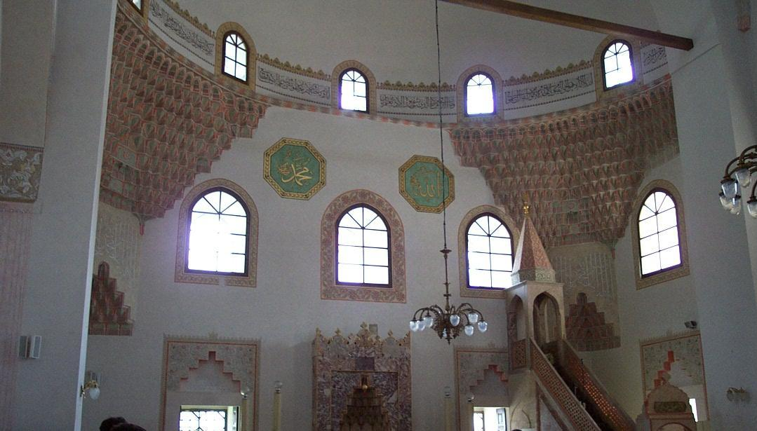 Interiér Gazi Husret-begovy mešity v Sarajevu